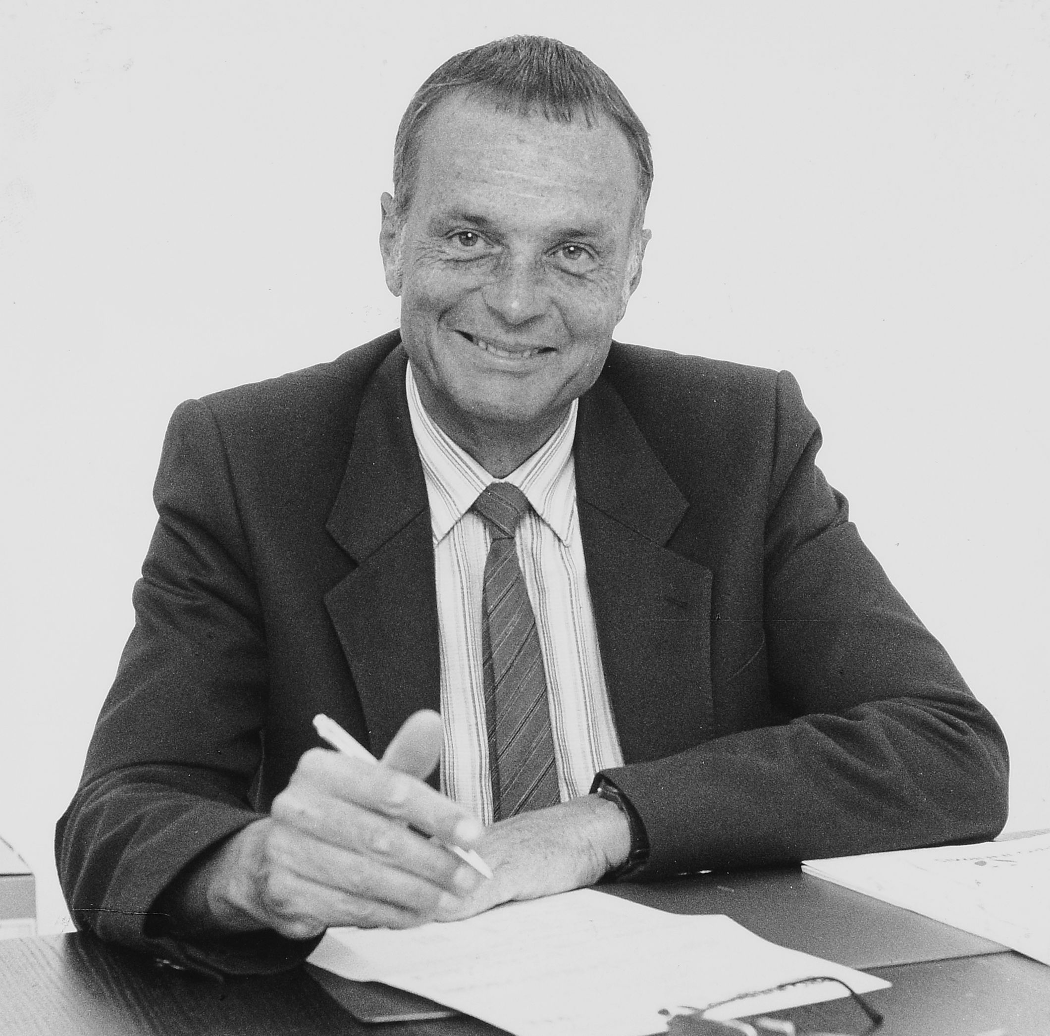 Porträt Dr. Walter Biel